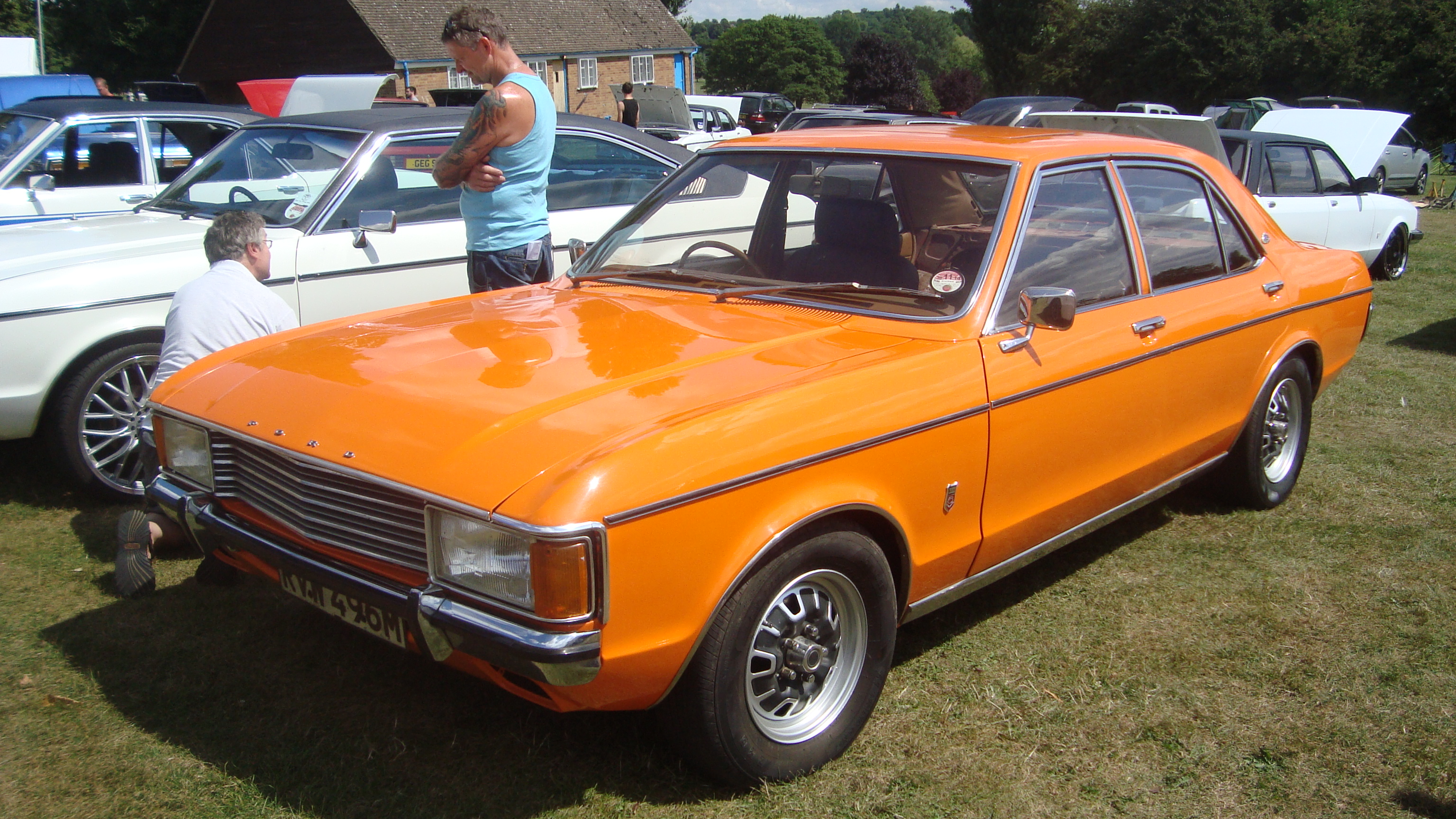 1974 Ford Granada GXL 3.0